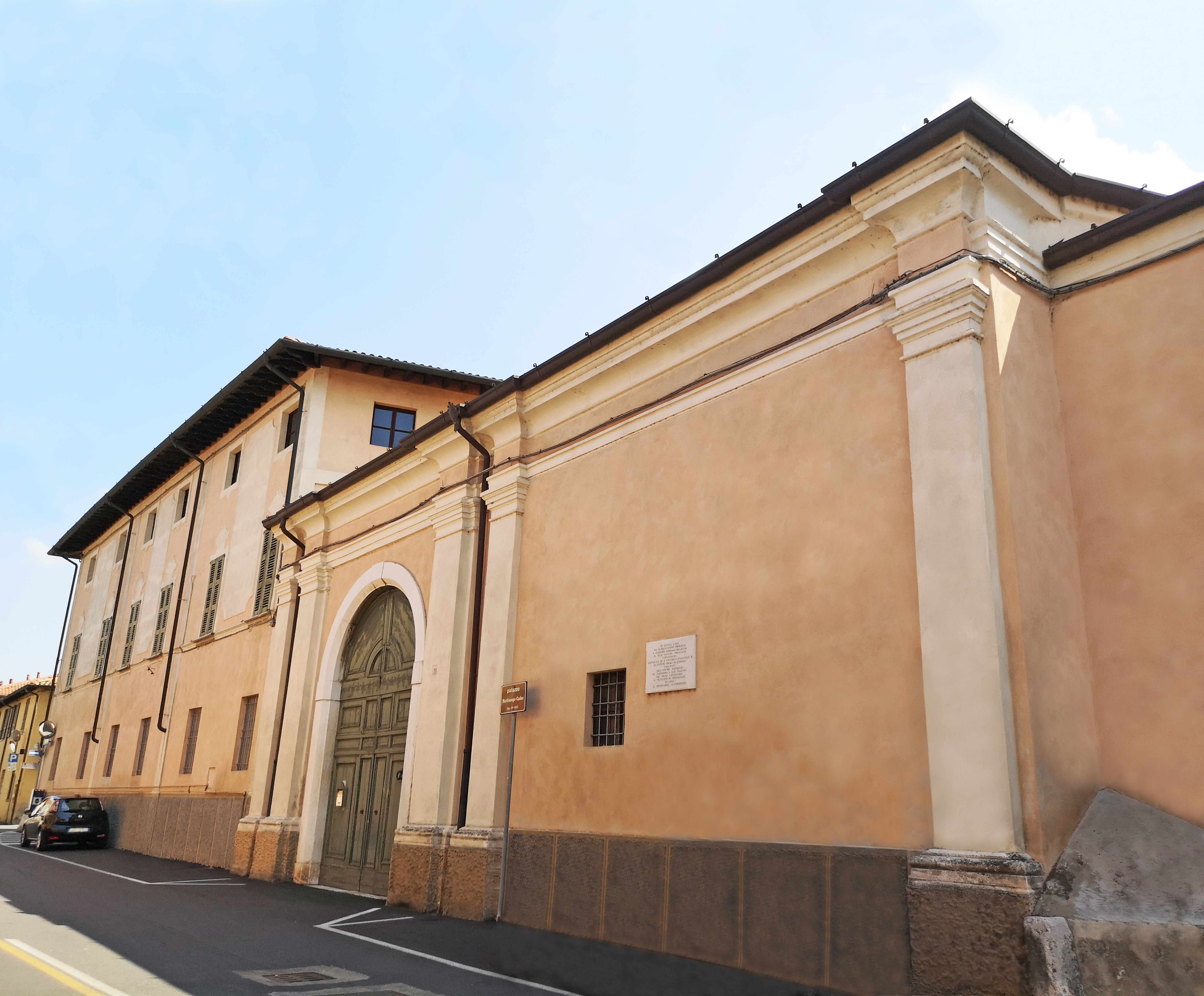 Palazzo Martinengo-Cadeo a Travagliato